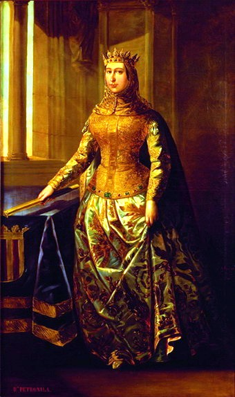 Retrato imaginario de la reina Petronila de Aragón (1136-1173), que fue hija del rey Ramiro II de Aragón, esposa del conde Ramón Berenguer IV de Barcelona y madre de Alfonso II el Casto.